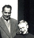 Marc'harid Gourlaouen ha Per Denez en he zi e Douarnenez.